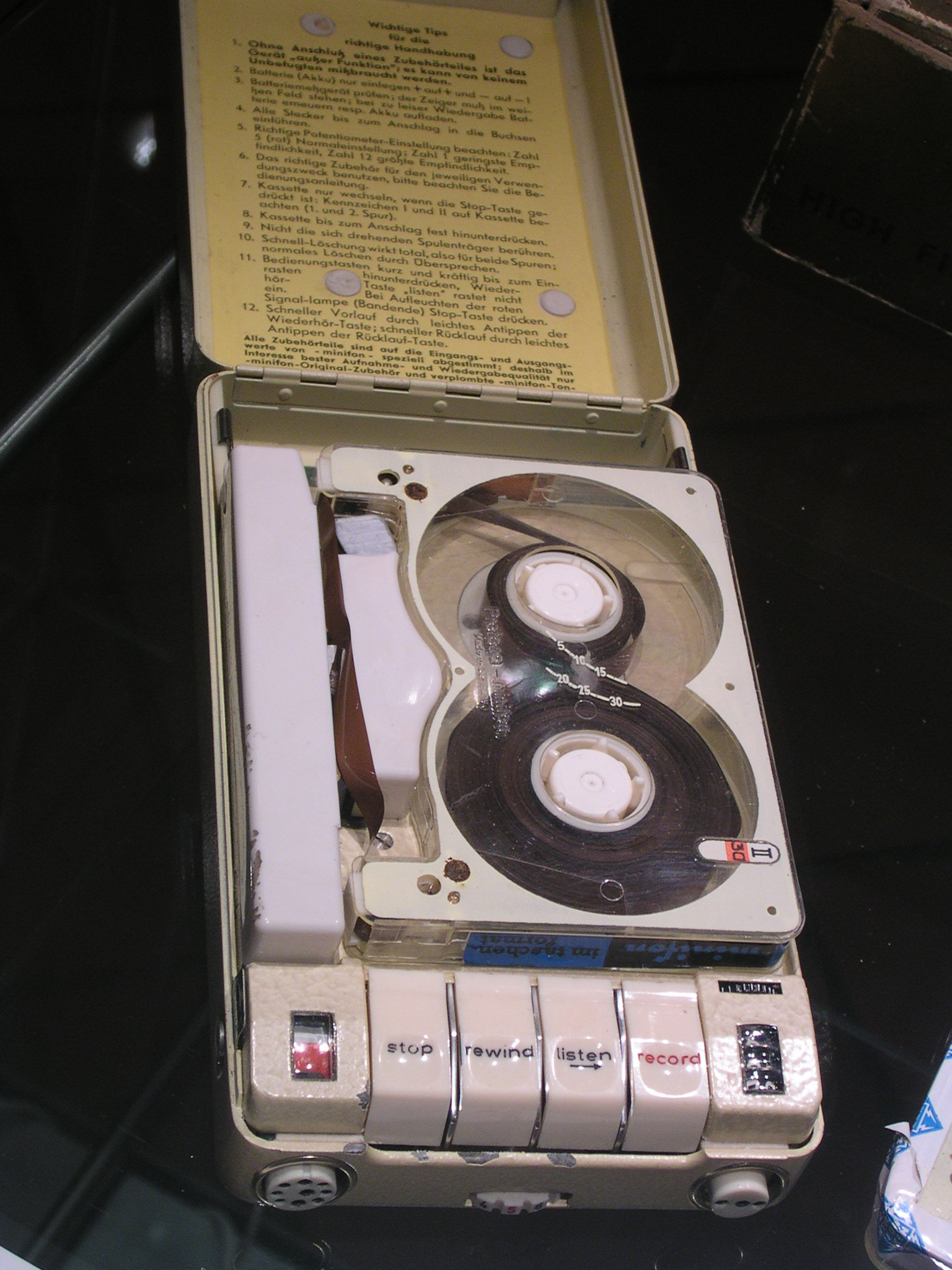 Protona Minifon Attaché, Bauzeit 1960-1962, Tonband- oder Diktiergerät, erstmals mit einer Bandcassette